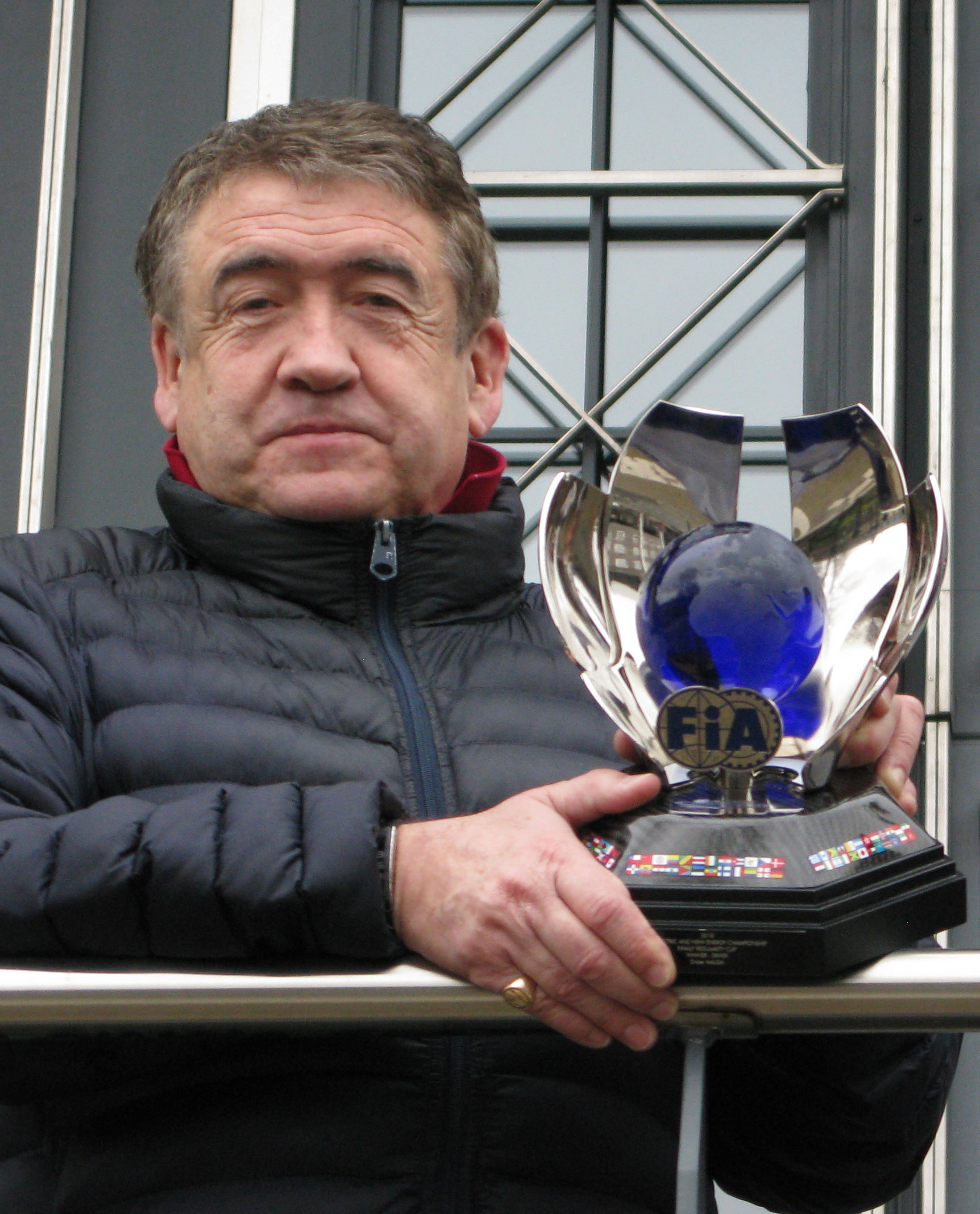 Didier Malga et son trophée FIA 2018